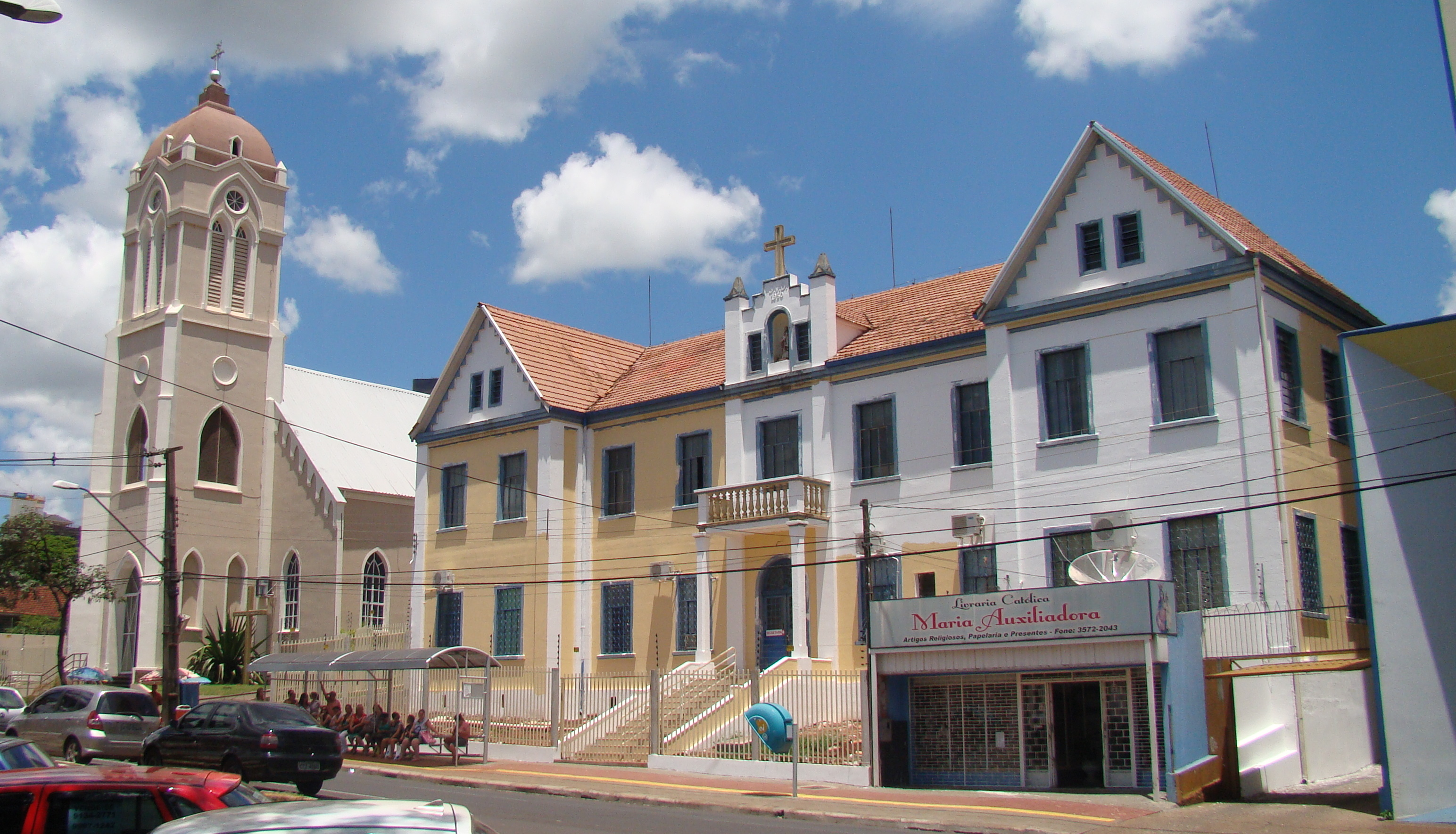 Catedral de São João Batista - Igreja Matriz de Foz do Iguaçu, Paraná, Sul do Brasil. Construção da primeira metade do séc. XX, situa-se na av. Jorge Schimmelpfeng, 70, centro.